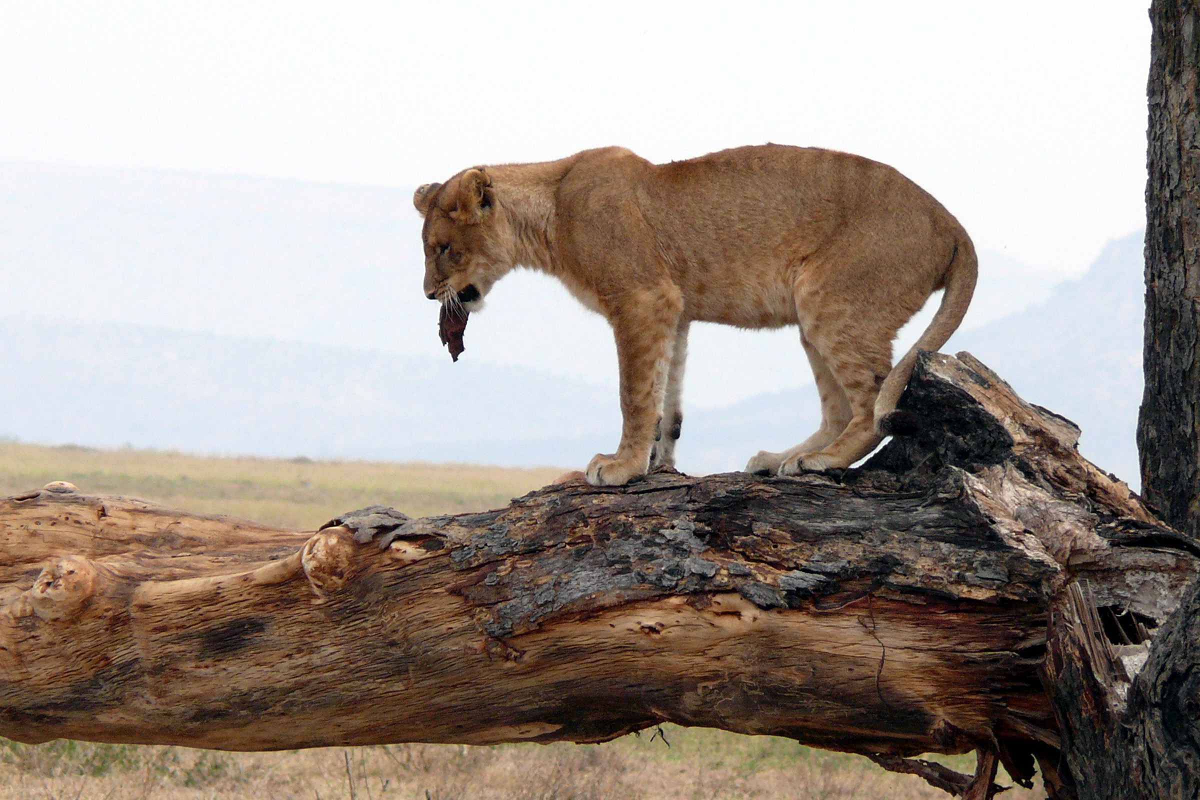 Halbwüchsiger Löwe spielt mit Rindenstück